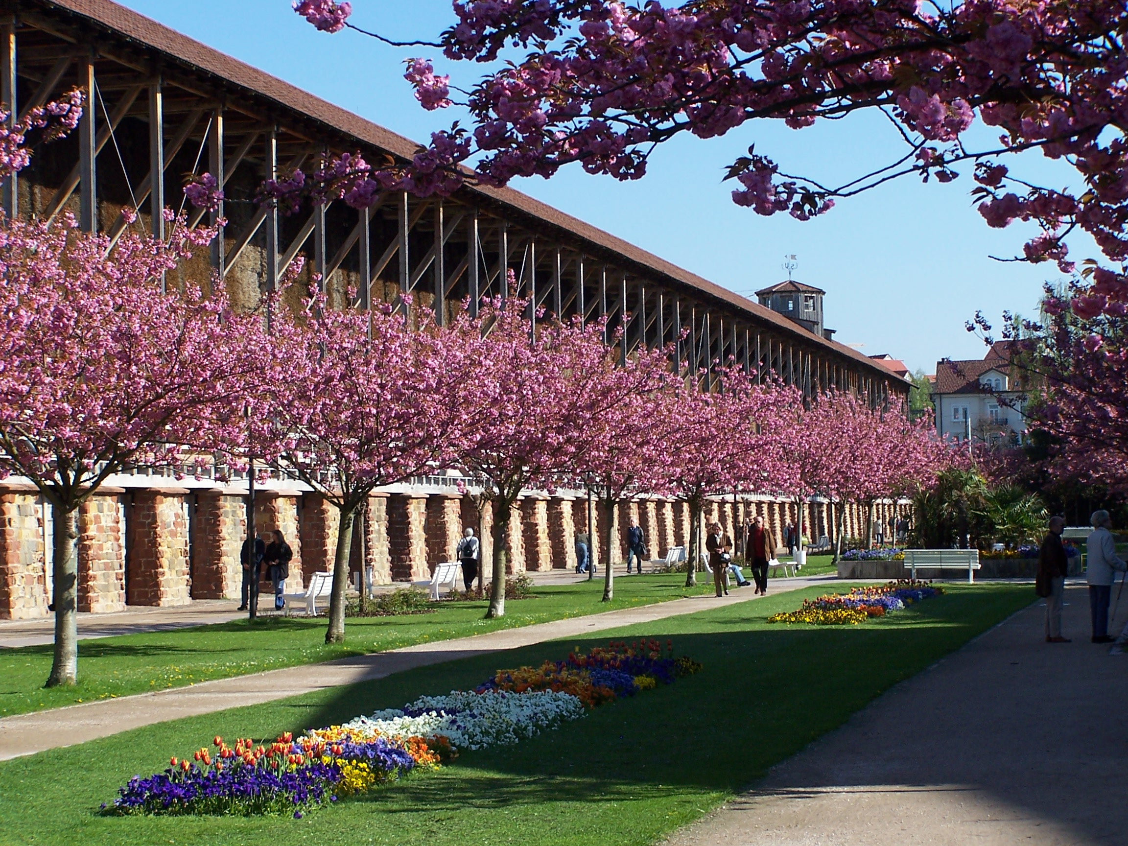 Bad Dürkheimer Gradierwerk